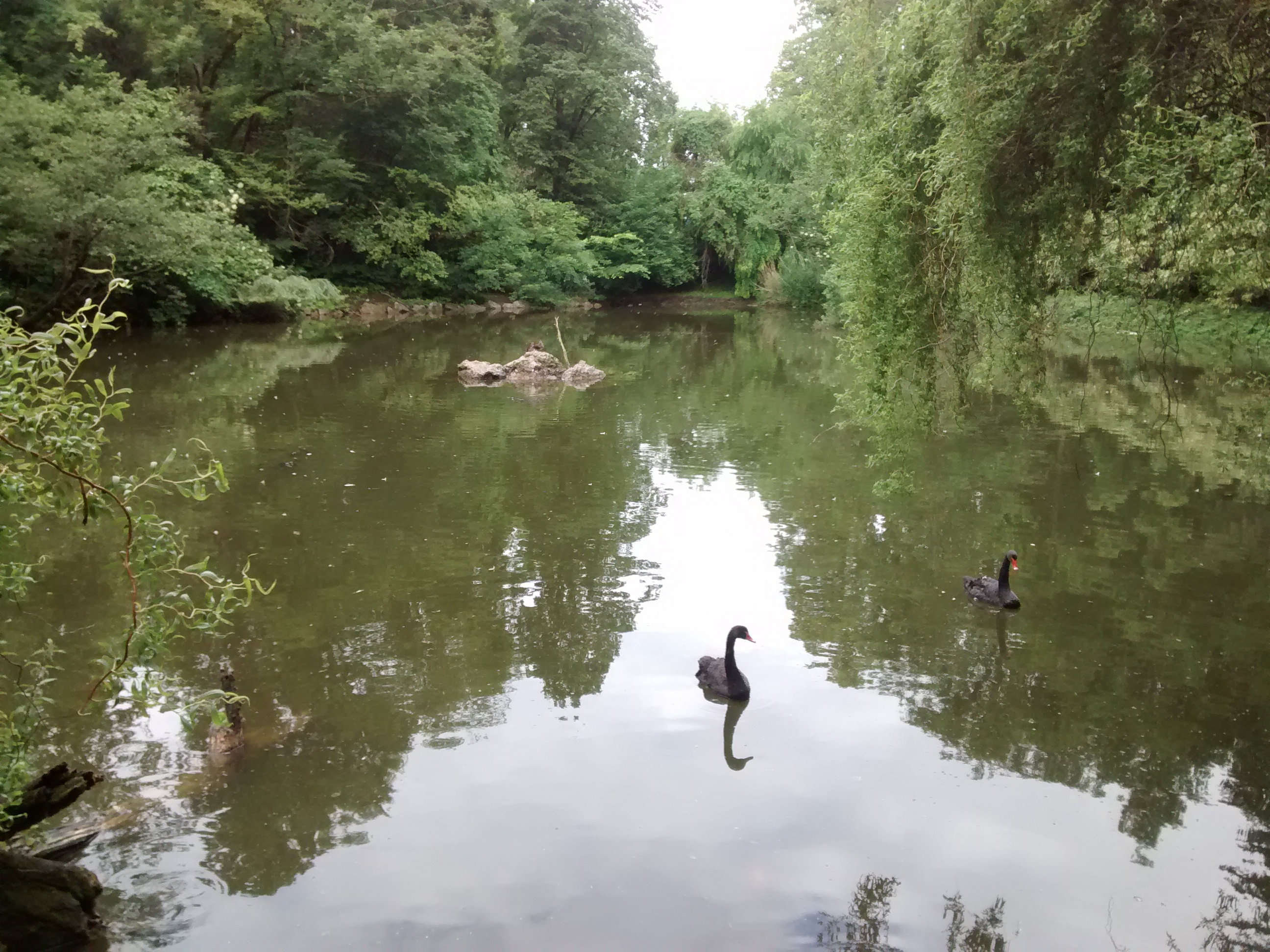 Grand Pond